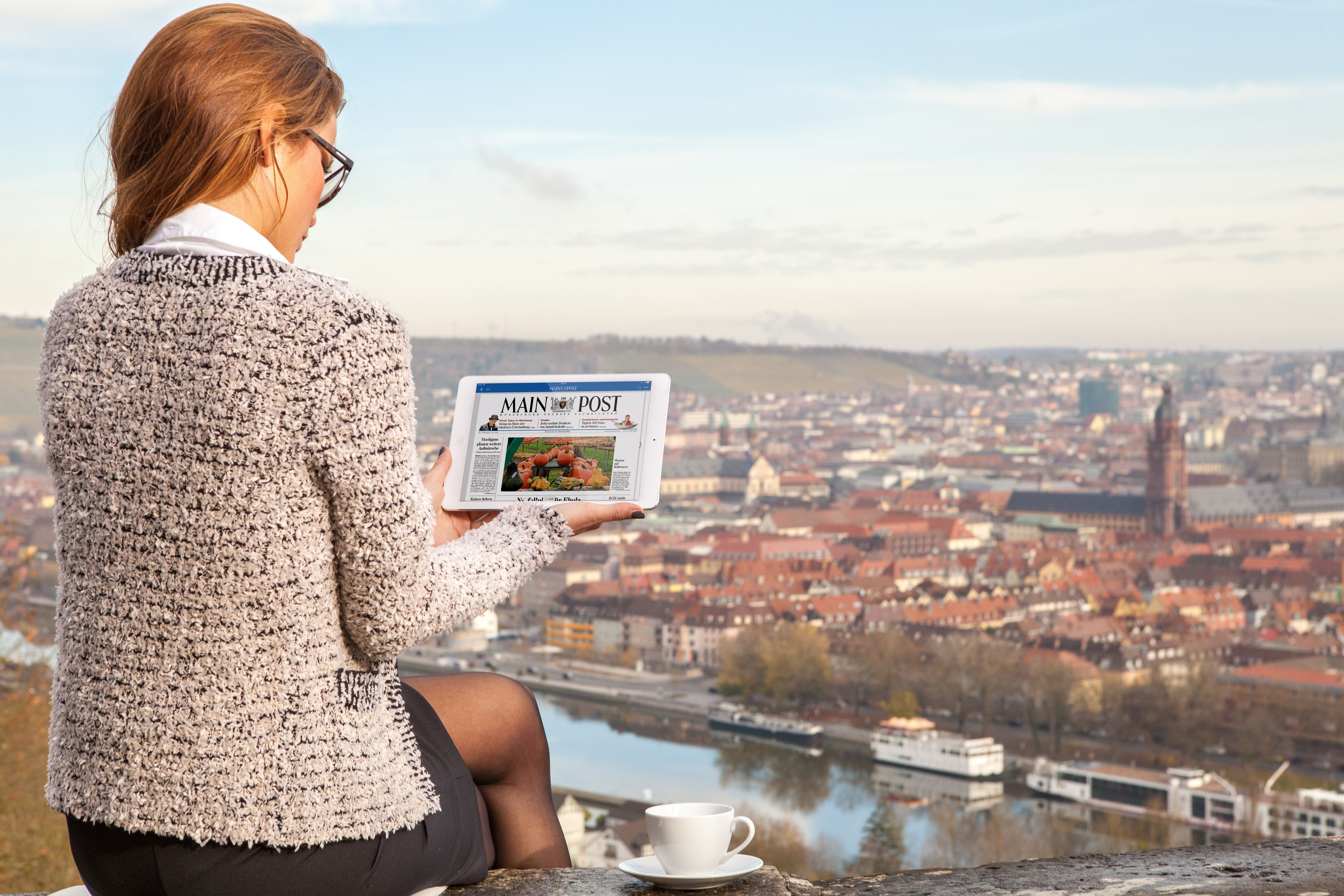 Die ePaper-App der Main-Post auf einem Tablet.